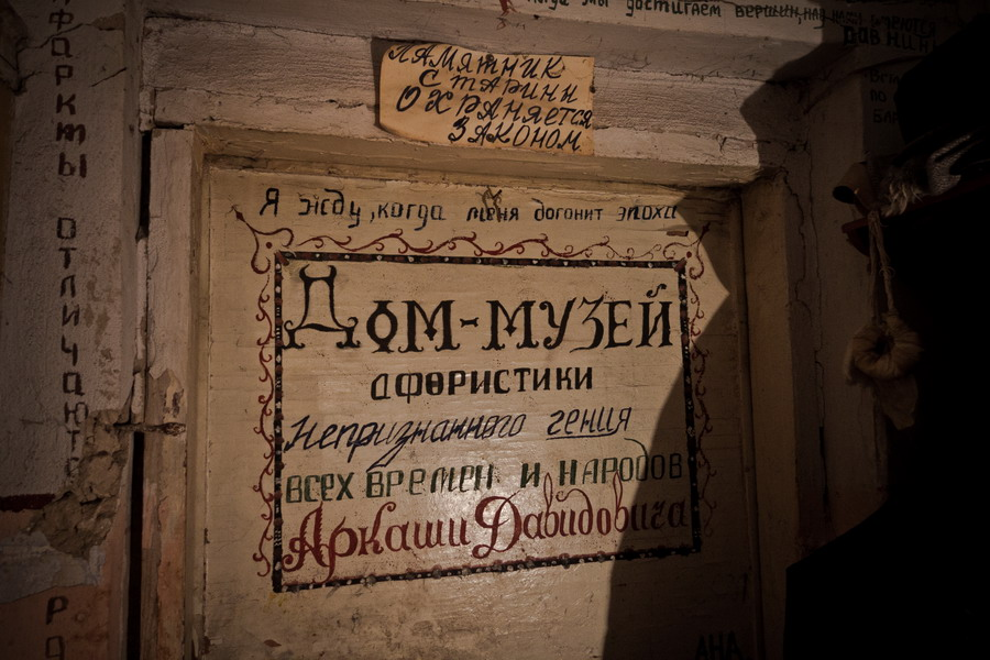 Дверь в музей афоризмов